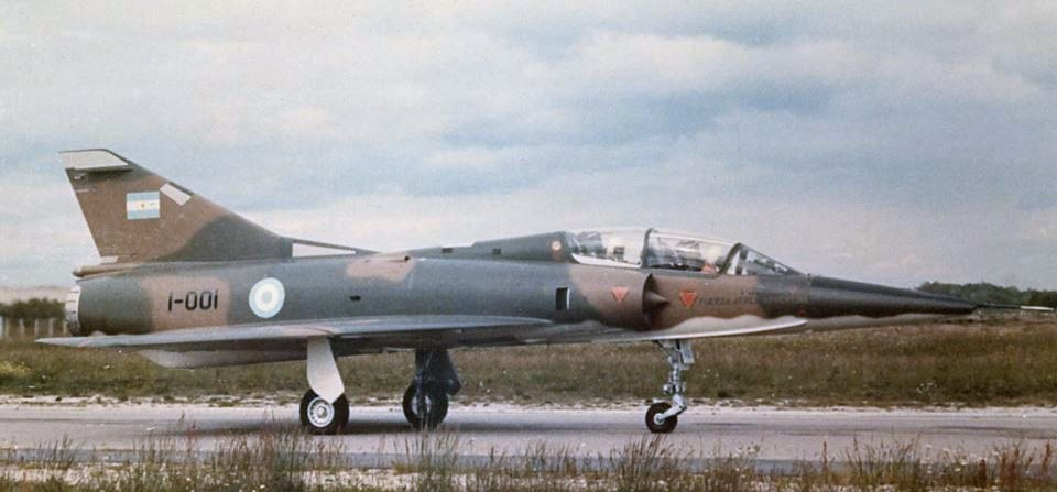 Un 5 de septiembre de 1972, llega al país a bordo del C-130 H TC-63 el primer ejemplar del sistema de armas Mirage III EA, matrícula I-001. Es el primer interceptor supersónico equipado con radar y misiles aire – aire de la Fuerza Aérea Argentina